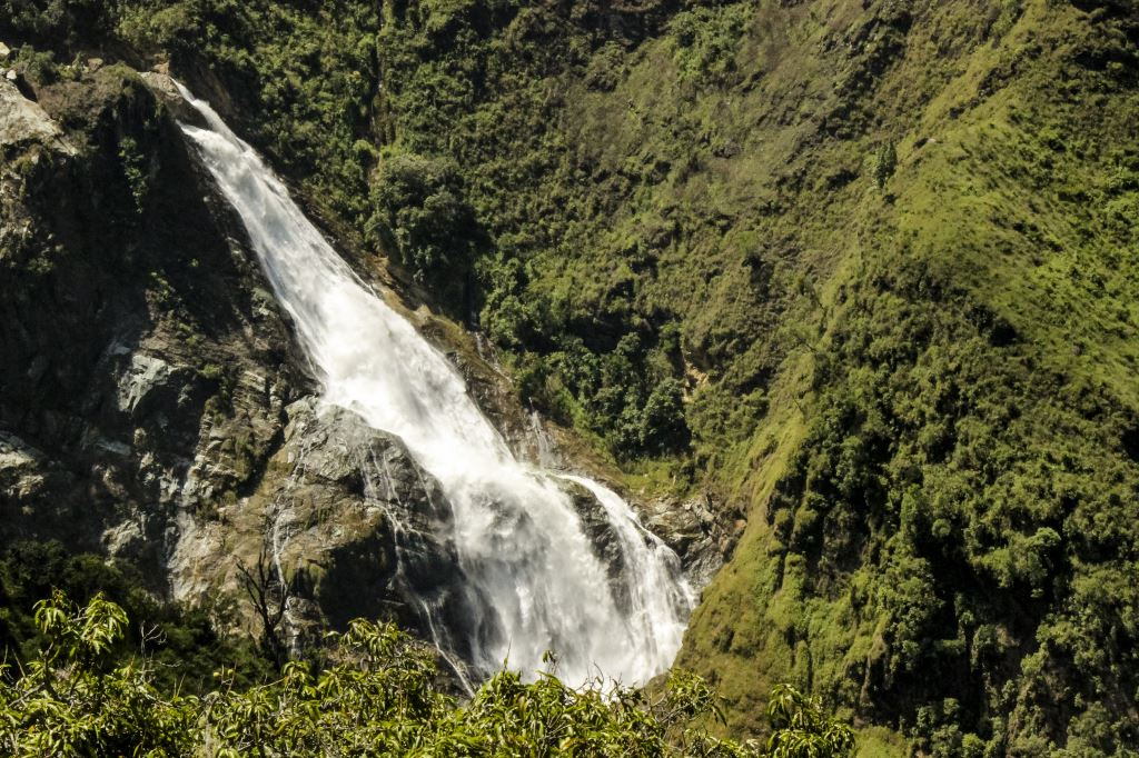 caida del rio aures